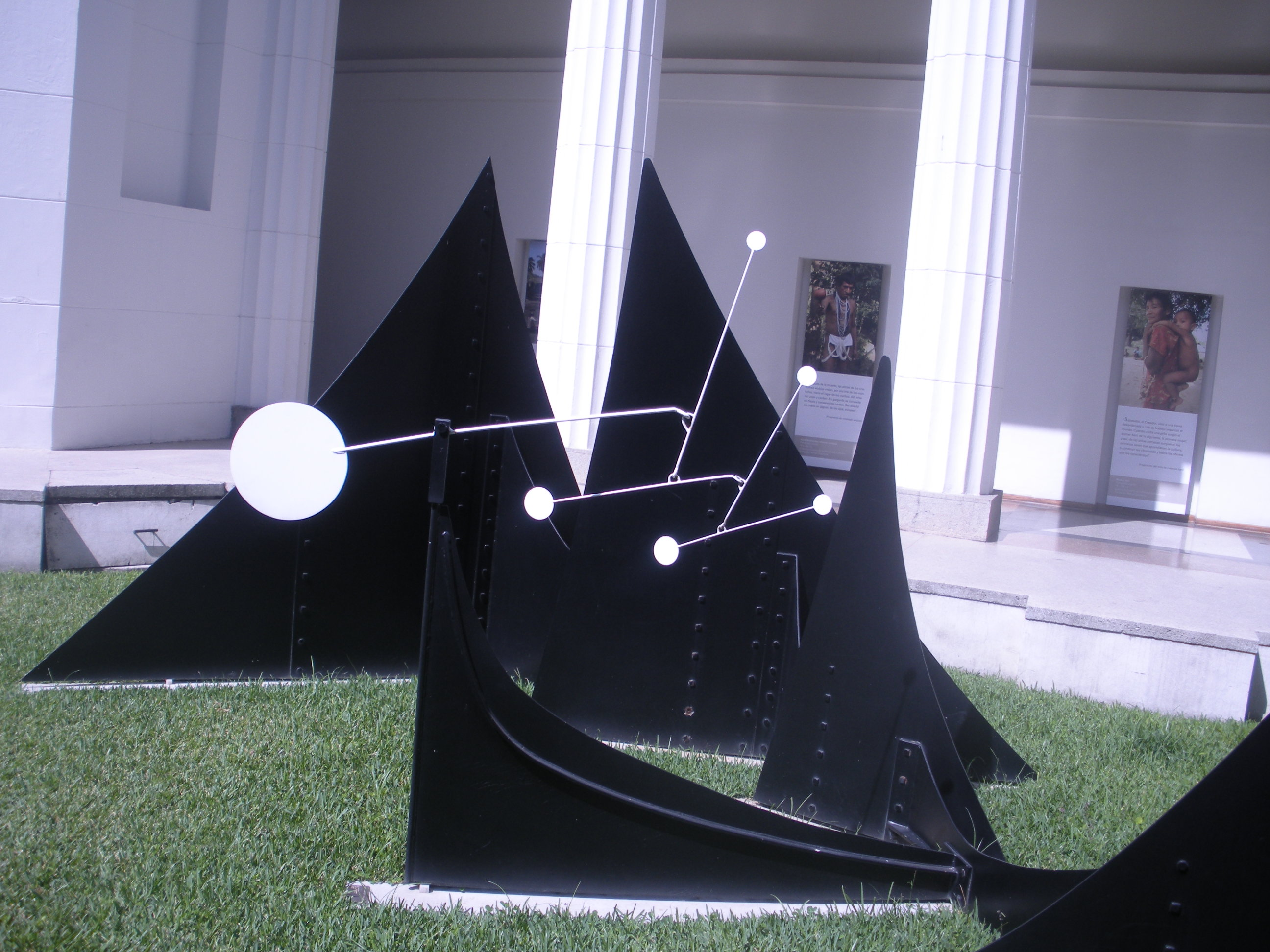 Escultura de Alexander Calder ubicada actualmente (Febrero, 2010) en el jardín interno de la Galería de Arte Nacional en Caracas, Venezuela.